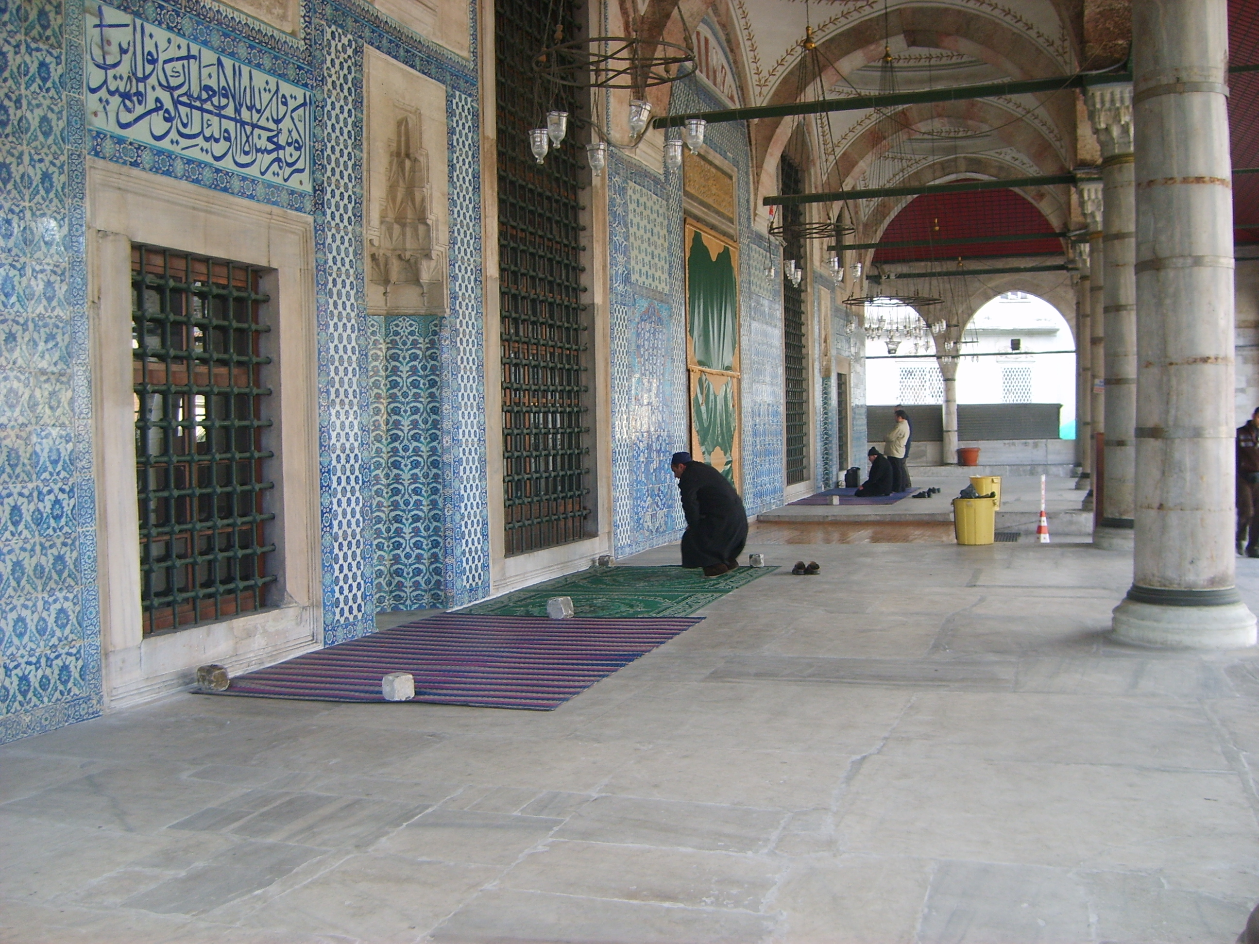 Praying Muslims in Eminönü, İStanbul